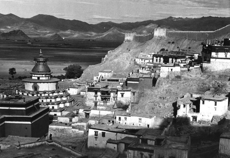 Gyantse, Teil der Stadt mit Tschorten